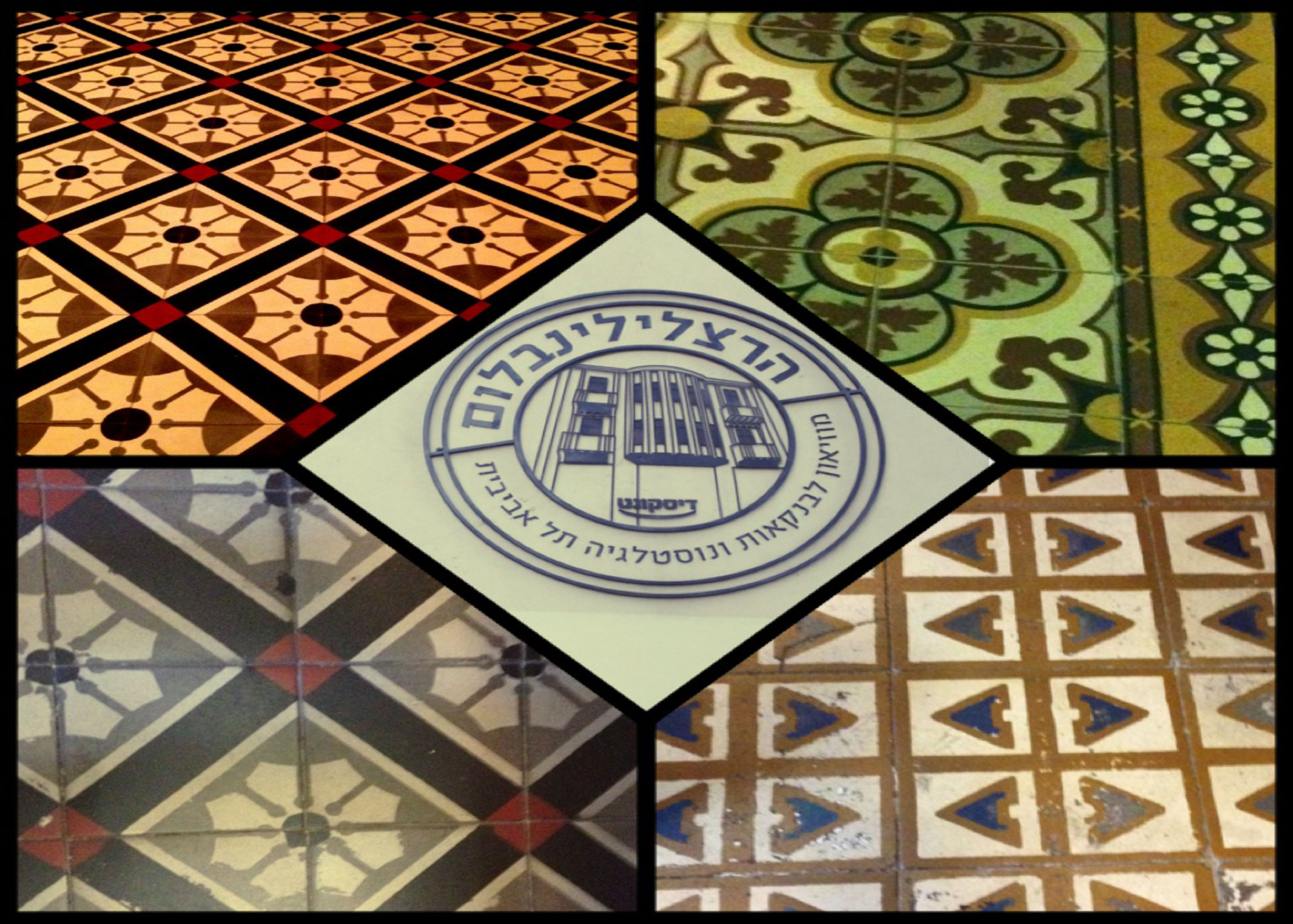 הרצלילינבלום - מוזיאון לבנקאות ונוסטלגיה תל אביבית הוא מוזיאון להיסטורית הבנקאות בתל אביב ובארץ ישראל. המוזיאון הוקם בתל אביב על ידי בנק דיסקונט. המוזיאון הוקם ב"בית שיף" בקרן הרחובות הרצל ולילינבלום. הקומה הראשונה של הבית נבנתה בשנת 1909 כבית מגורים פרטי של משפחת פרנק, בחלקה שבה זכתה בהגרלת המגרשים לאחוזת בית. לאחר מכן נמכר הבית למשפחת שיף ובשנת 1924 נוספו לו שתי קומות. This is a photo of a heritage building in Israel. Its ID is 3-5000-201